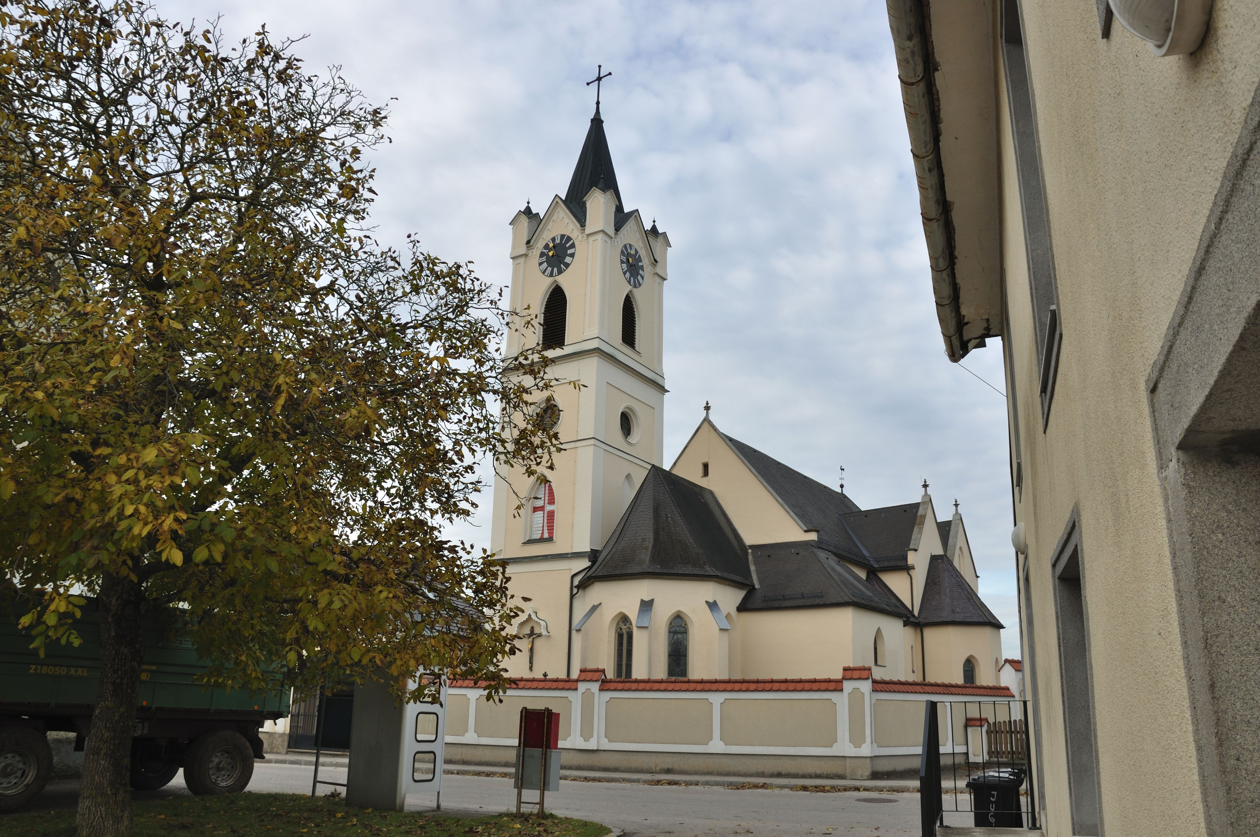 Kath. Pfarrkirche hl. Andreas